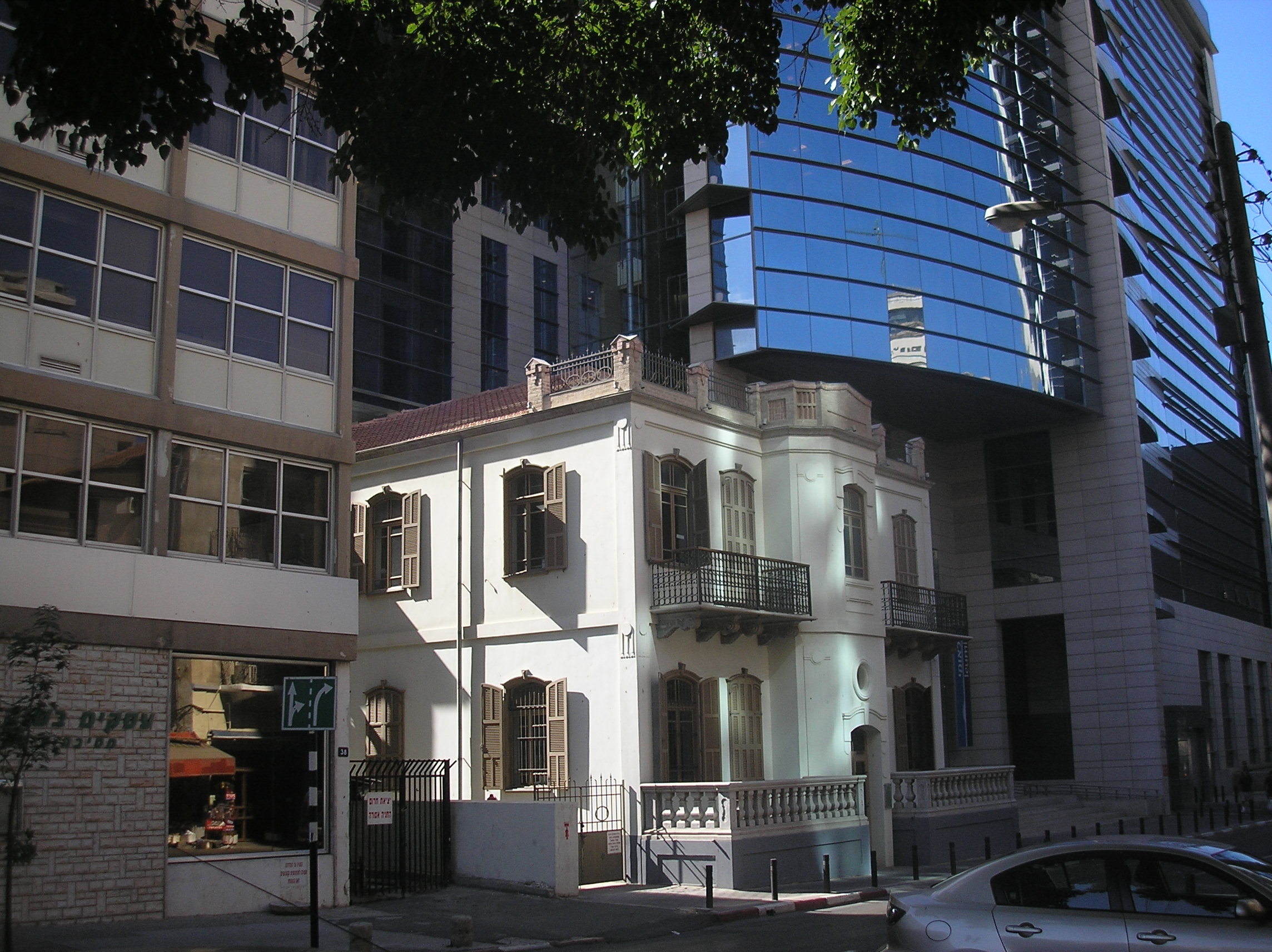 Yehuda Halevi Street